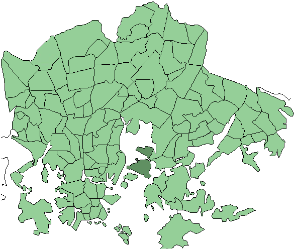 Districts of Helsinki, Kulosaari highlighted (in Finnish Kulosaaren osa-alue)